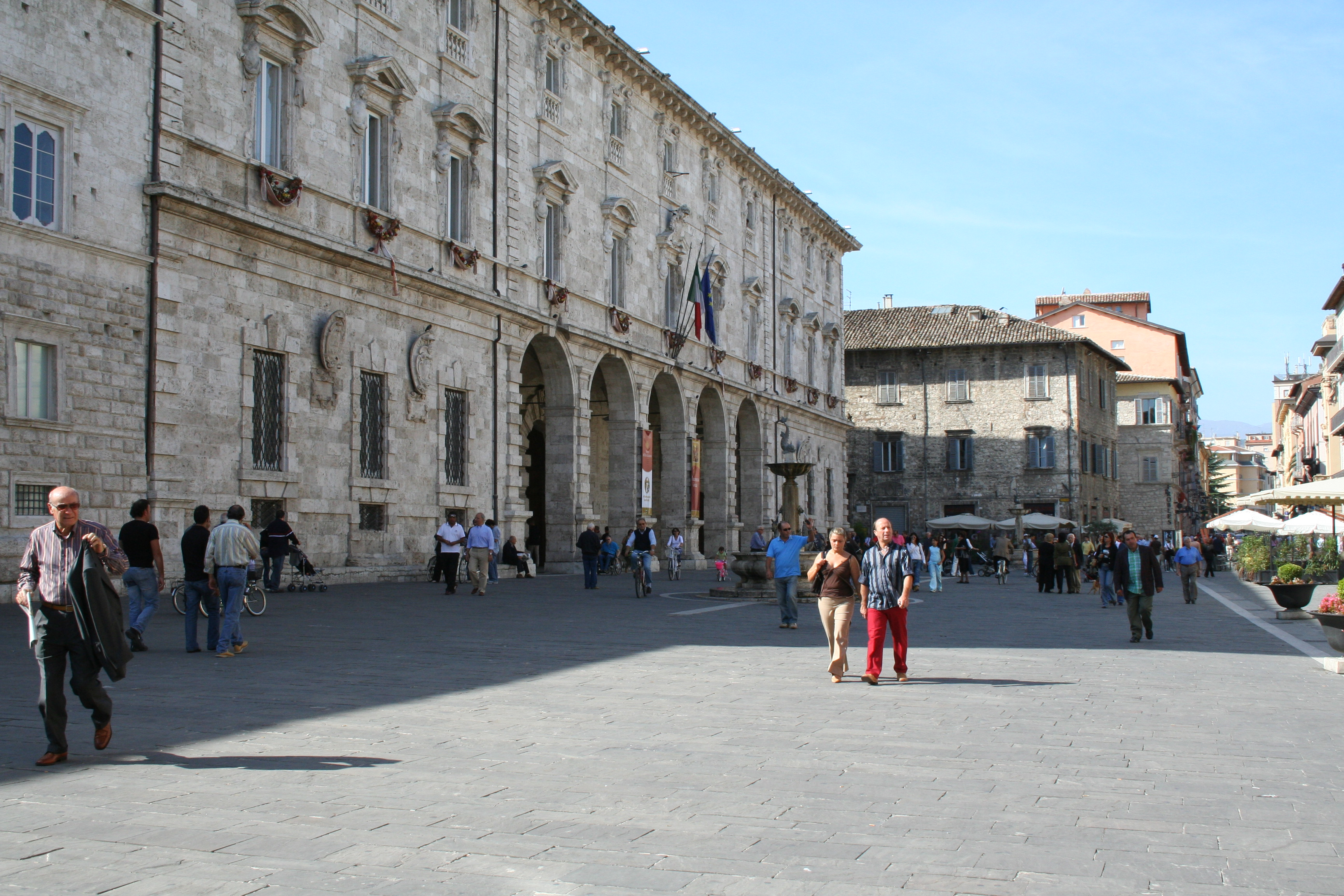 Palazzo dell'Arengo in Ascoli Piceno, ottobre 2006